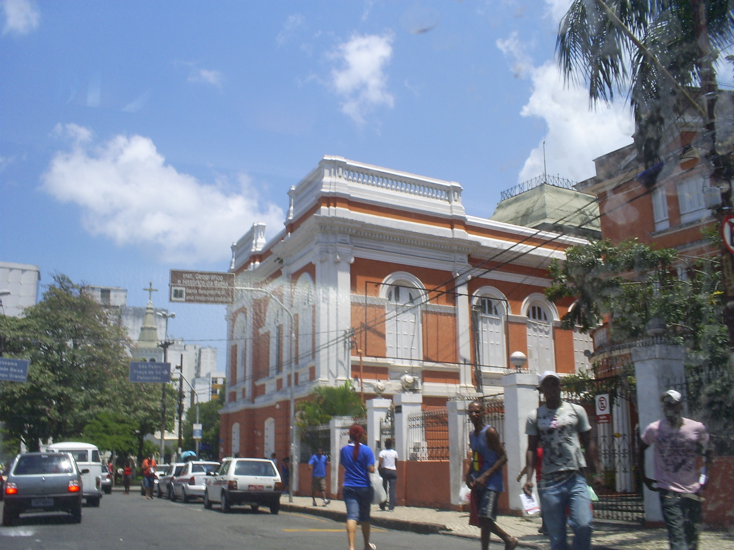 Foto do Instituto Histórico e Geográfico da Bahia, Salvador, Bahia, Brasil.